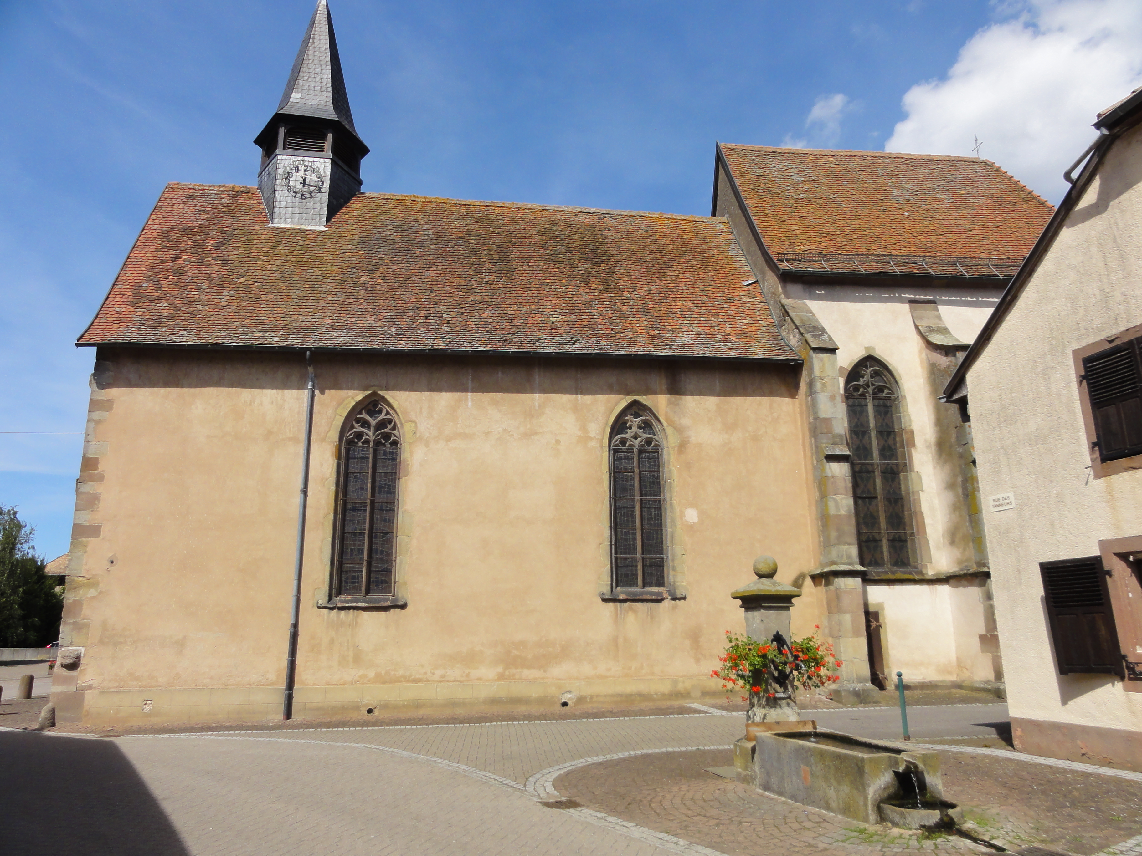 Alsace, Bas-Rhin, Sarrewerden, Église Saint-Barthélemy (ancienne Collégiale Saint-Blaise) (PA00084945, IA67005982).